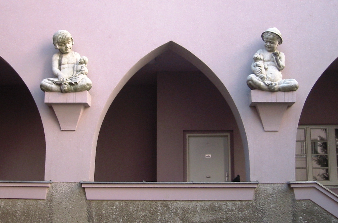 Wien Dr.-Franz-Klein-Hof Plastiken